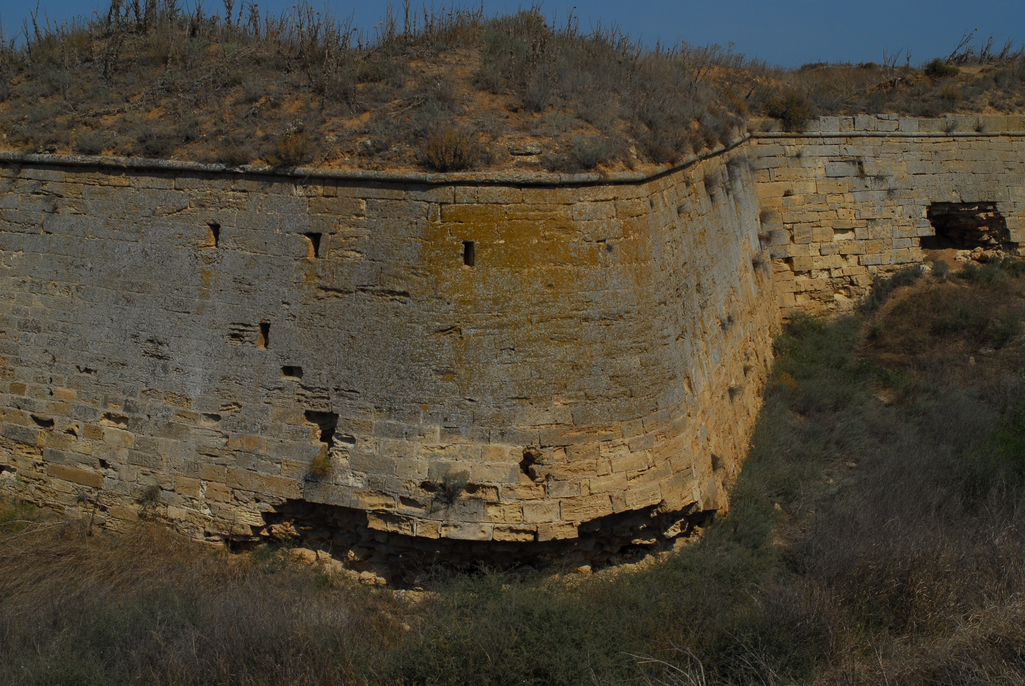 Азовская Крепость, на въезде на Арабатскую стрелку со стороны Крыма